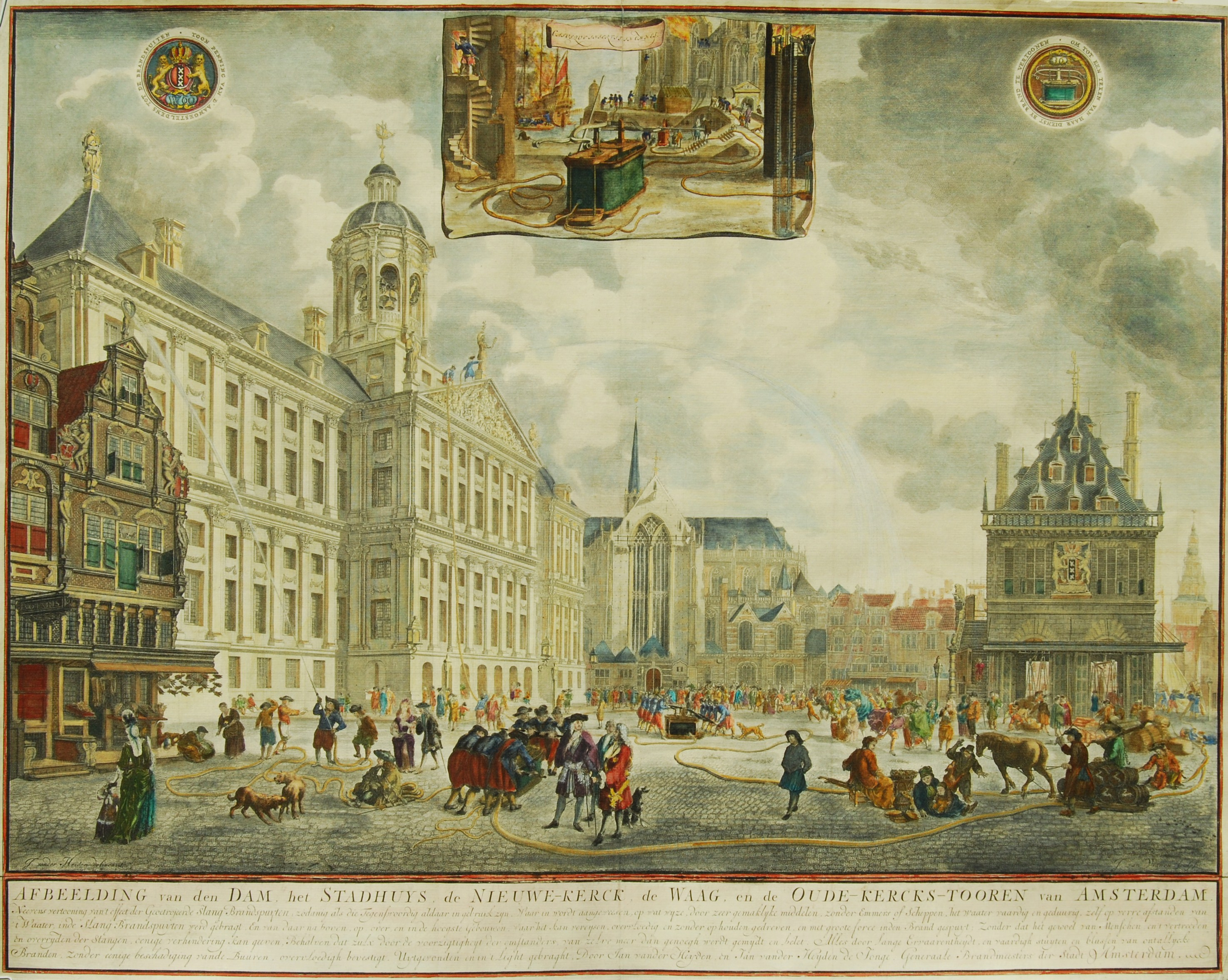 Afbeelding van den Dam, het Stadhuys, de Nieuwe-Kerck, de Waag en de Oude-Kercks-Tooren van Amsterdam. Neevens vertooning van ‘t effect der Geoctrojeerde Slang Brandspuyten. Ets vervaardigd rond 1680 door Jan van Vianen (ca. 1660 – na 1726) naar het ontwerp van Jan van der Heijden (1637 – 1712). Afm. 53 x 67 cm.